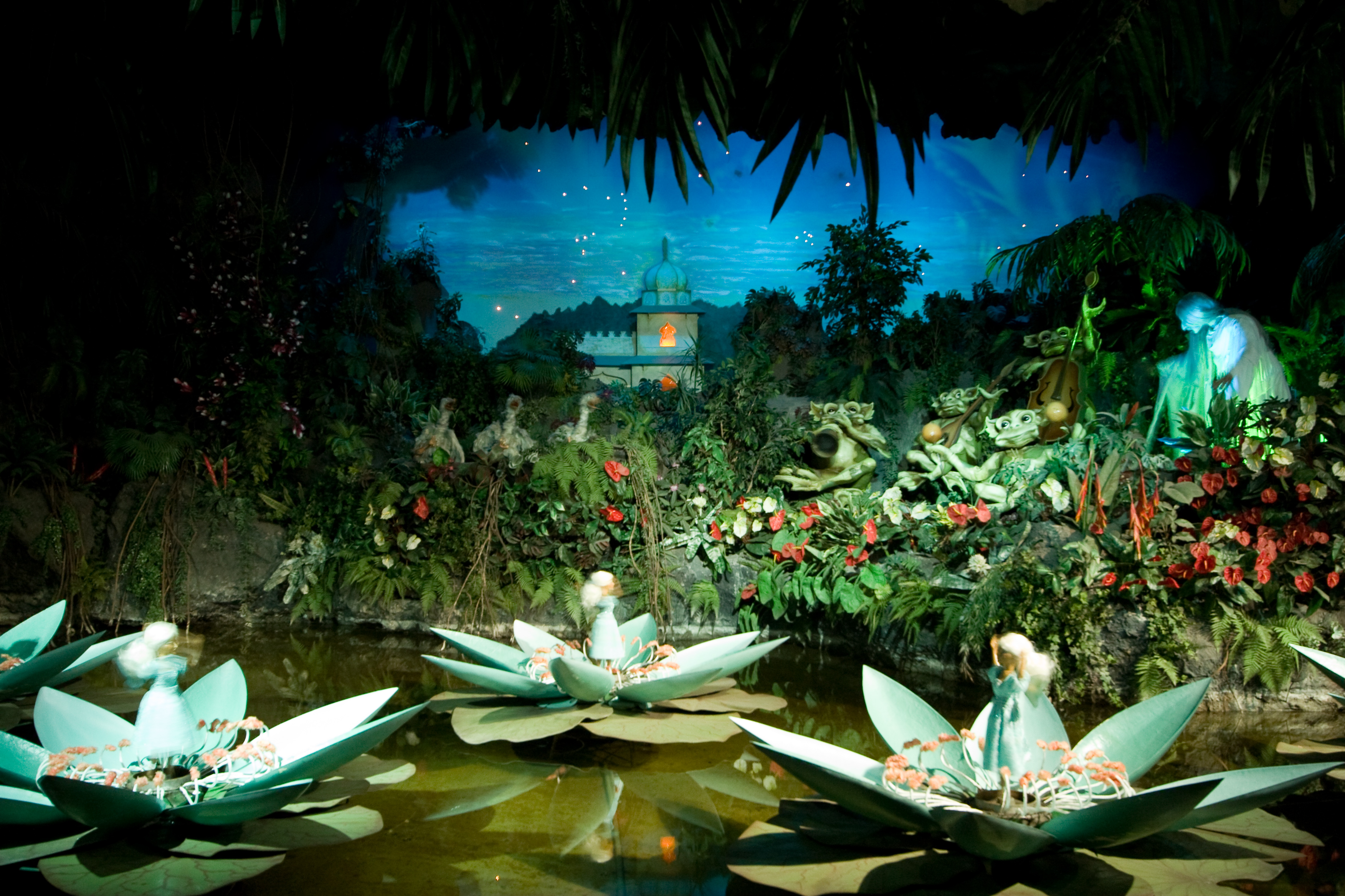 Efteling: De Indische waterlelies, naar een sprookje van koningin Fabiola van België.